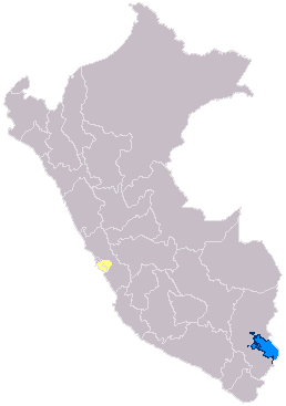 Zona de dominio del Señorío Ichma o Ychsma (valles del Rímac y Lurín, en Lima).